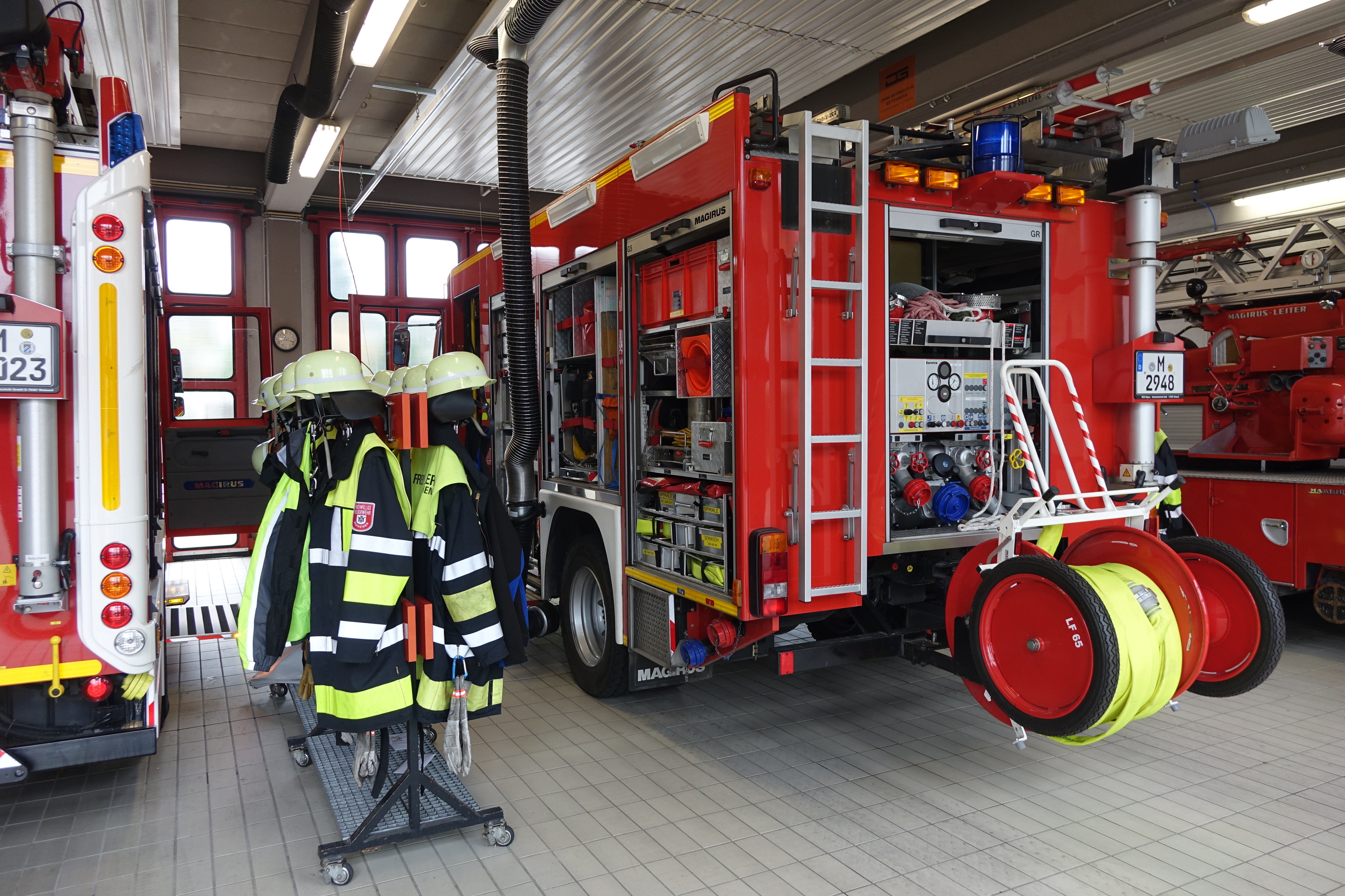 Freiwillige Feuerwehr Harthof, Munich, Germany, September 29, 2014